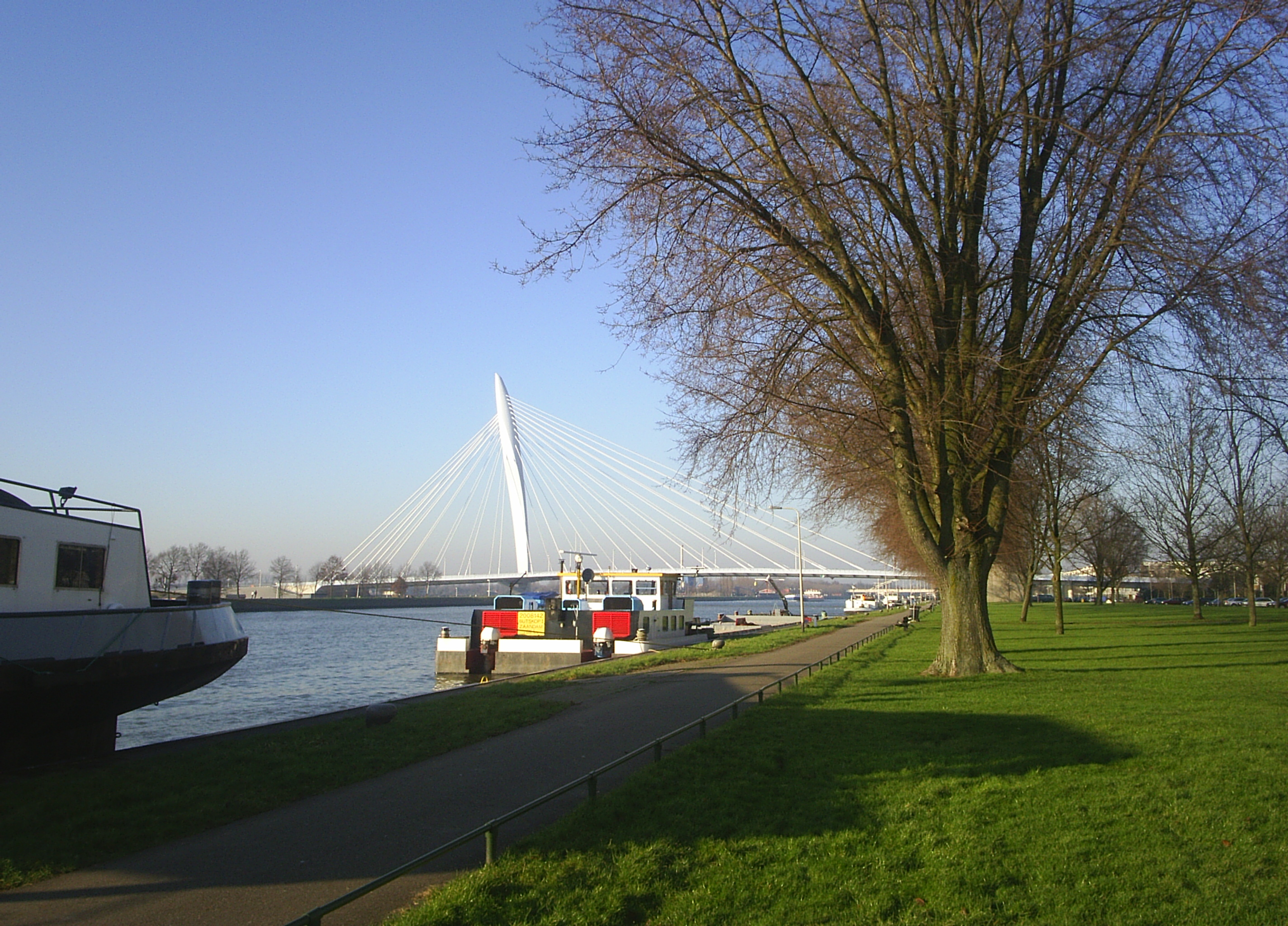 The Prins Clausbrug in Utrecht